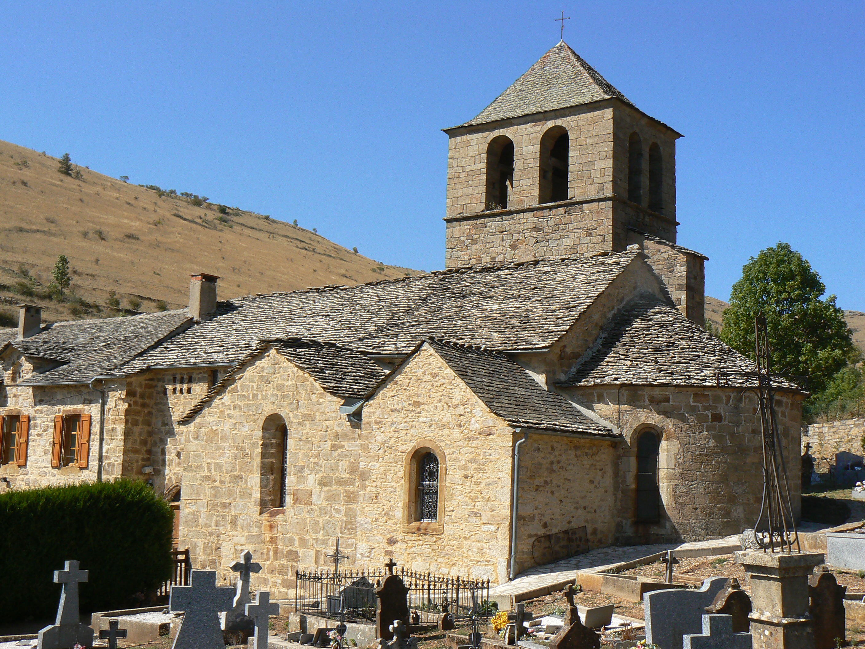 Eglise de la commune des Bondons (Lozère)